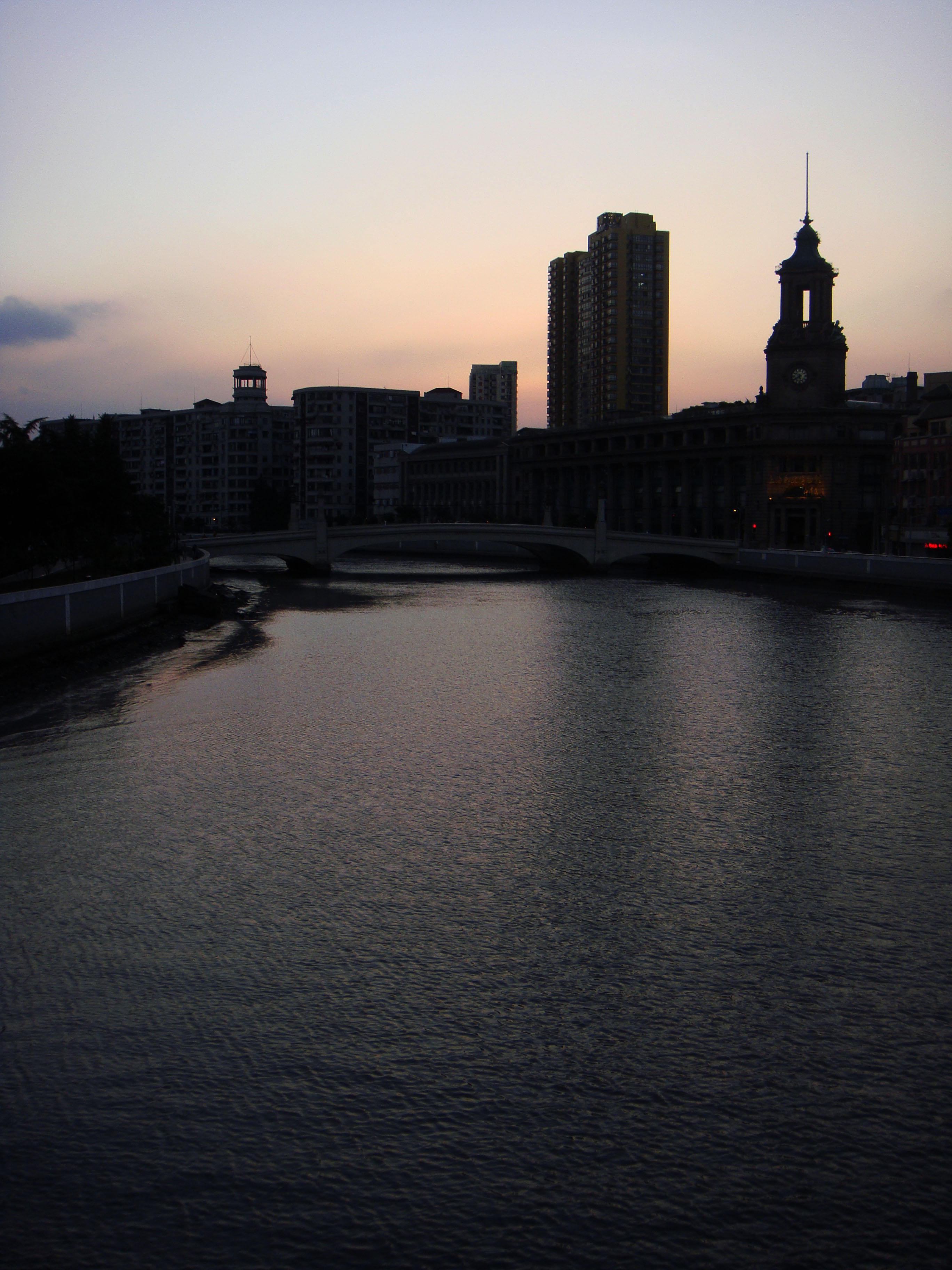 中文（中国大陆）: 2011年9月，由乍浦路桥像四川路桥方向拍摄的苏州河黄昏吴语: 11年9月份，从乍浦路桥拍个苏州河夜快头个景色